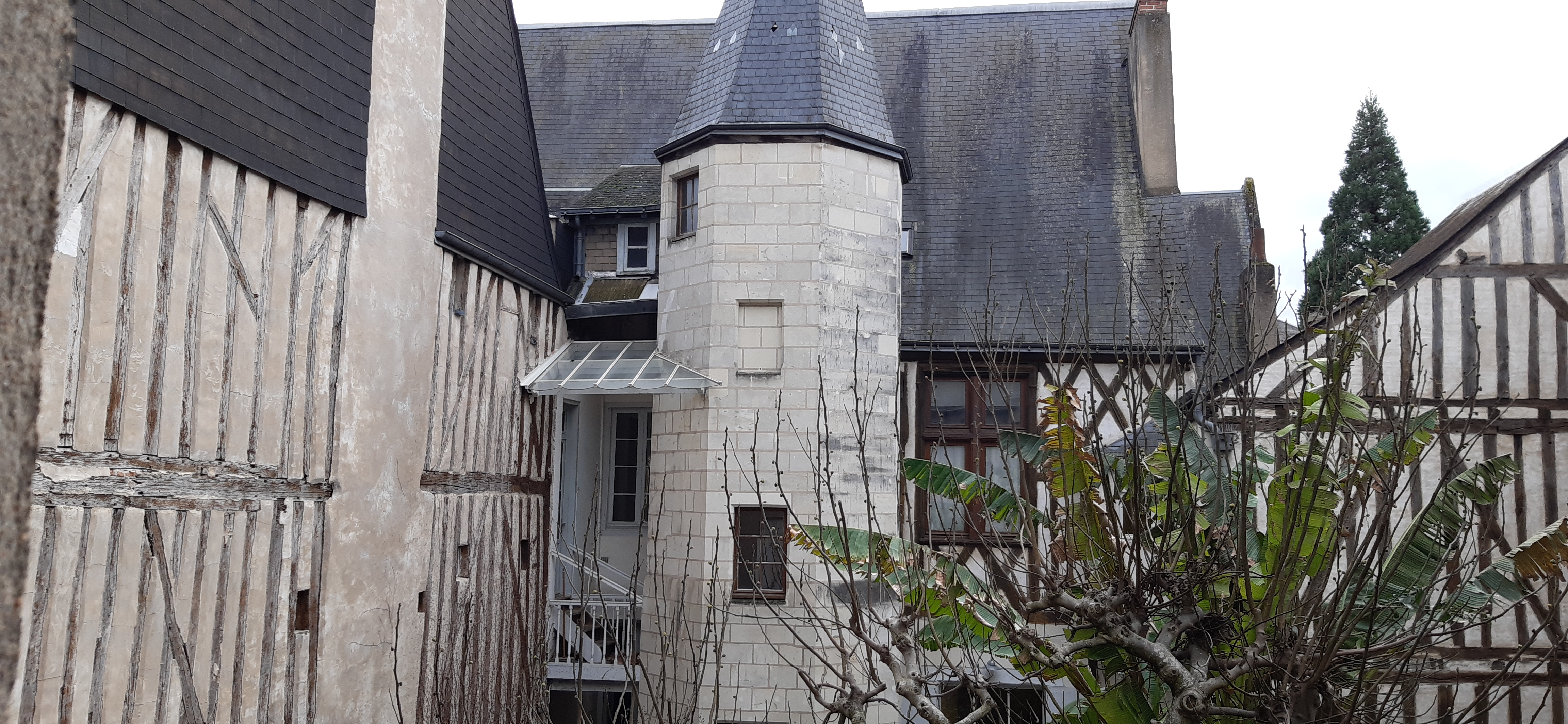 Tours, le Grenier à Sel de la Grande Rue, 59 67 rue Colbert